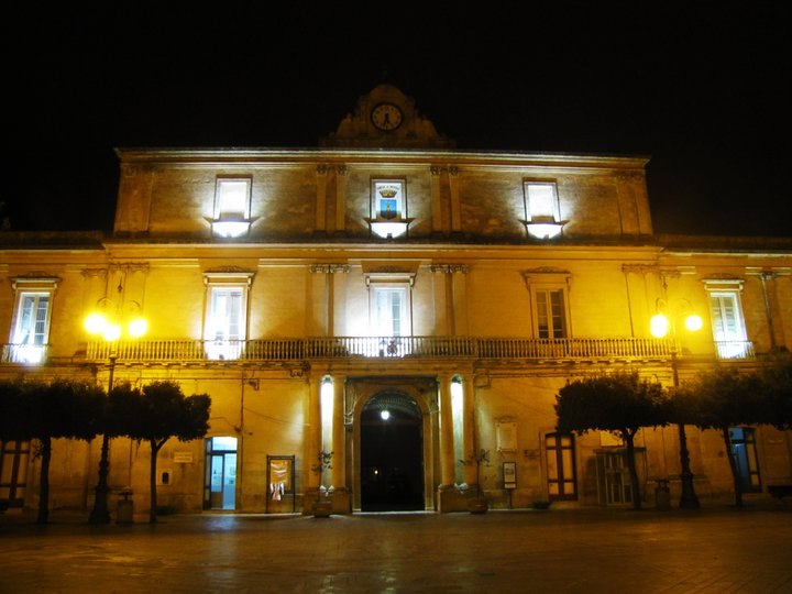 Palazzo Ducale, sede del comune di Mottola, fotografato in notturna